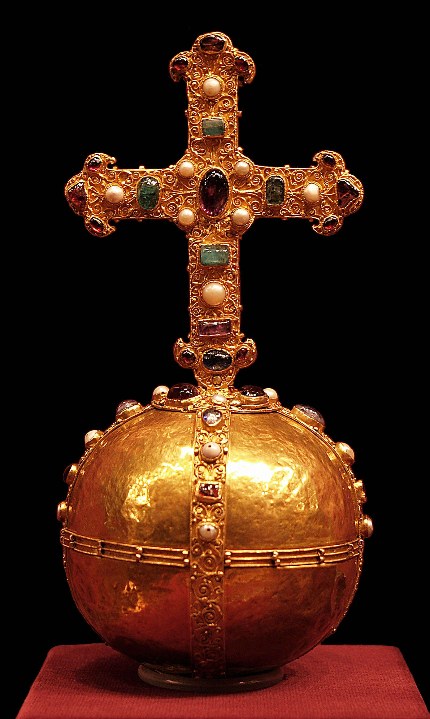 Der Reichsapfel, Teil der Reichskleinodien des Heiligen Römischen Reiches (HRE). Standort: Weltliche Schatzkammer, Wien